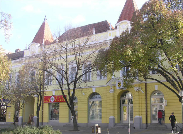 Le Théâtre national de la ville de Kikinda, en Serbie (province autonome de Voïvodine